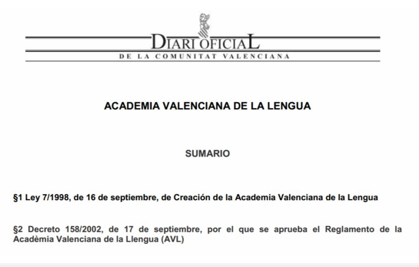 Portada de la ley de creación de la AVL